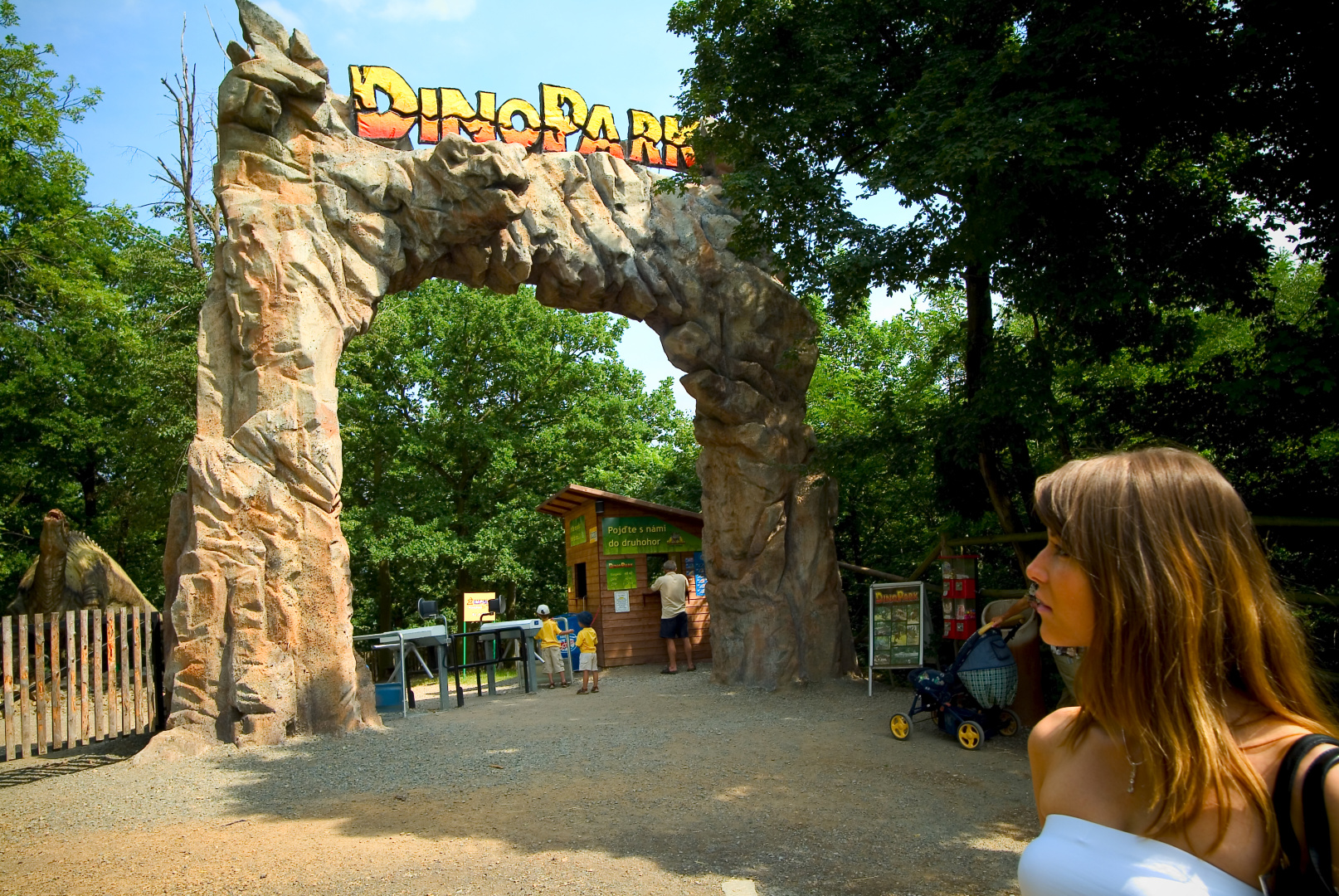 DinoPark Plzeň, gate